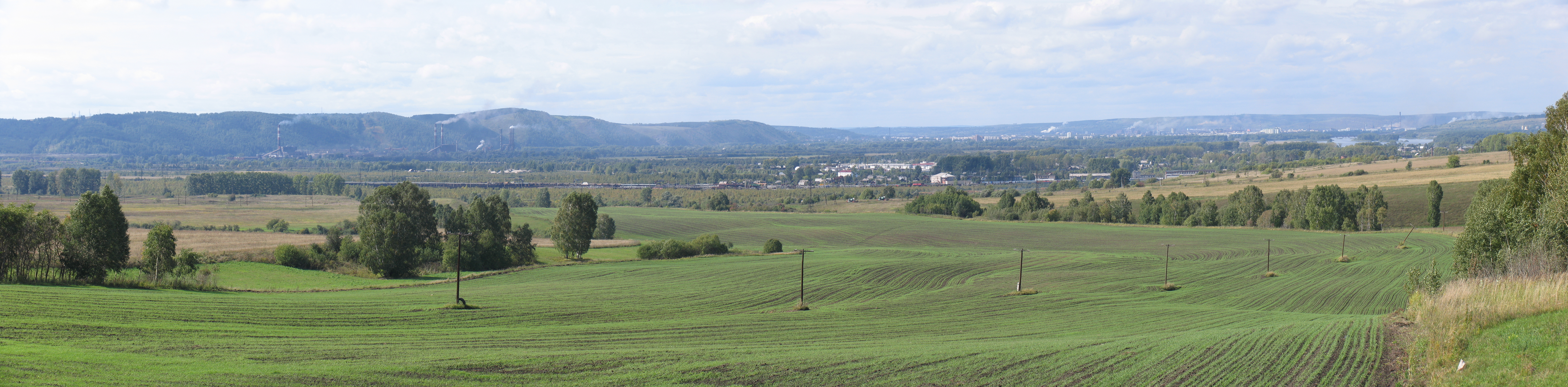 Панорама Новокузнецка и его восточный пригородов с объездной дороги.